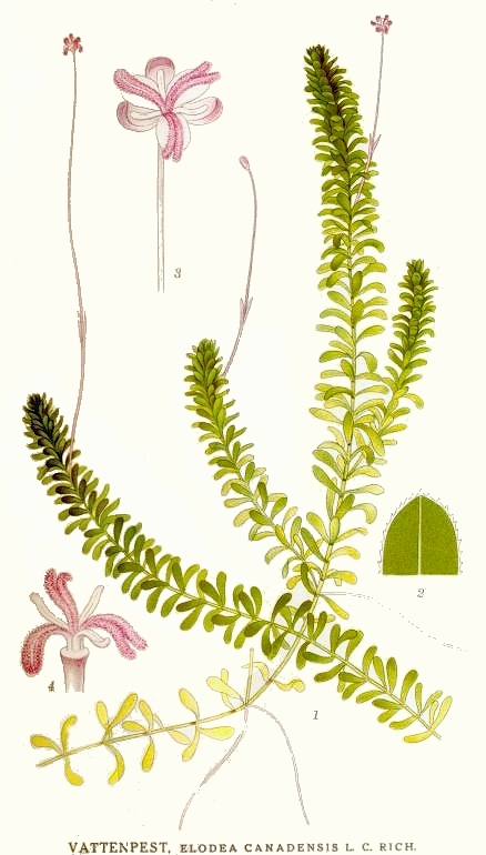 Elodea canadensis Michx. Original Description Vattenpest, Elodea canadensis L. C. Rich.